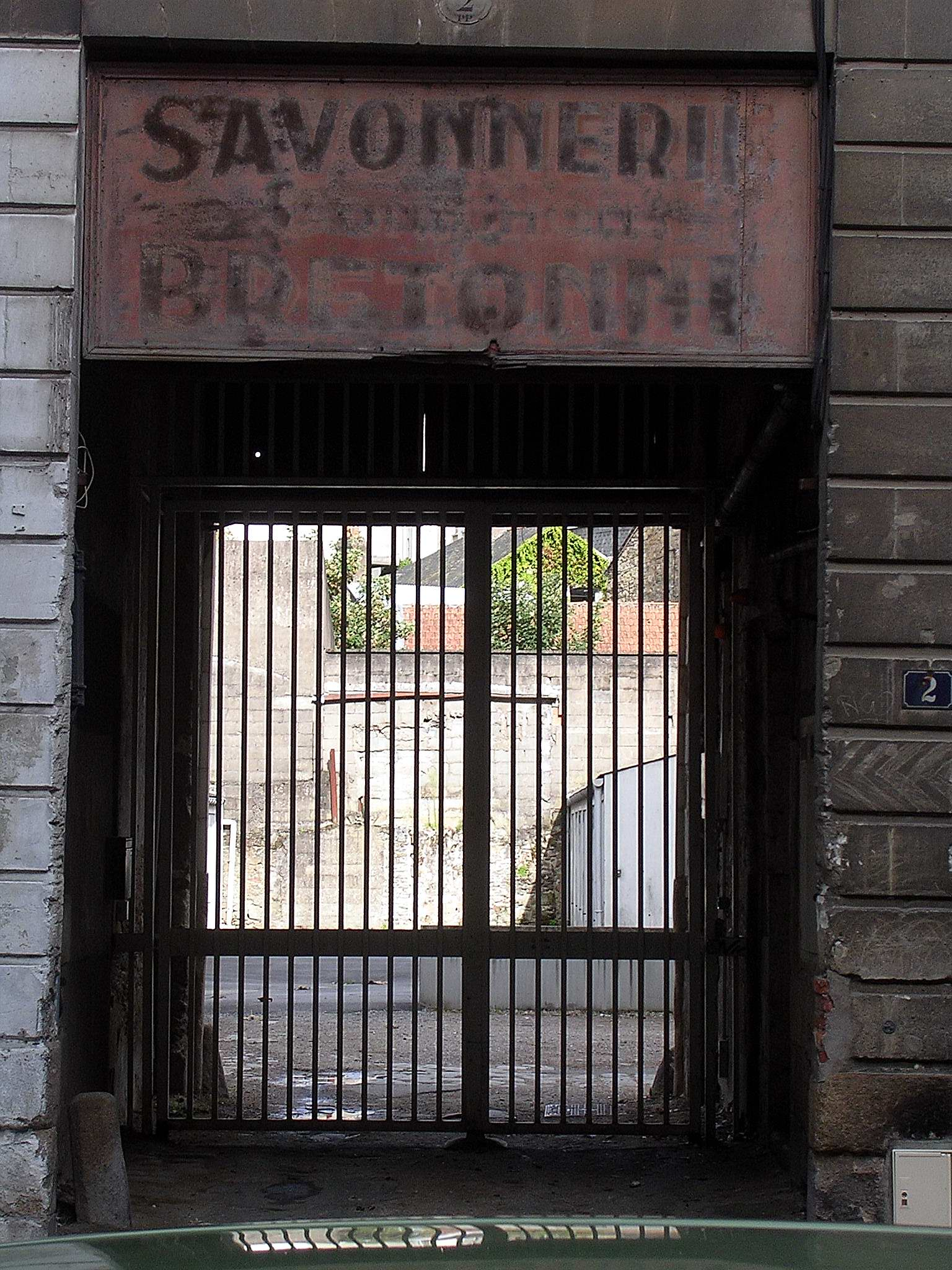 Façade de l'ancienne savonnerie Bretonne, occupant le site de l'ancienne Prison de l'Entrepôt des cafés. Actuellement au 2 rue Lamoricière, à Nantes